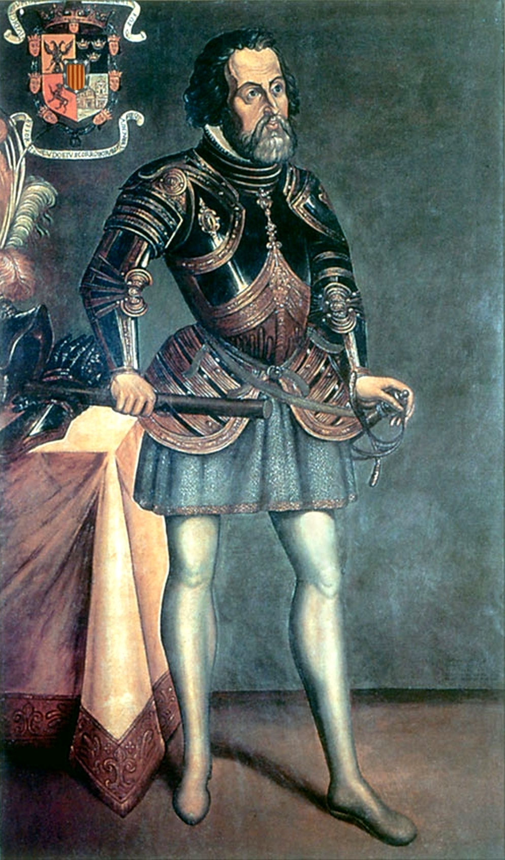 Se muestra al conquistador de México, Hernán Cortés, con su escudo en la parte superior izquierda